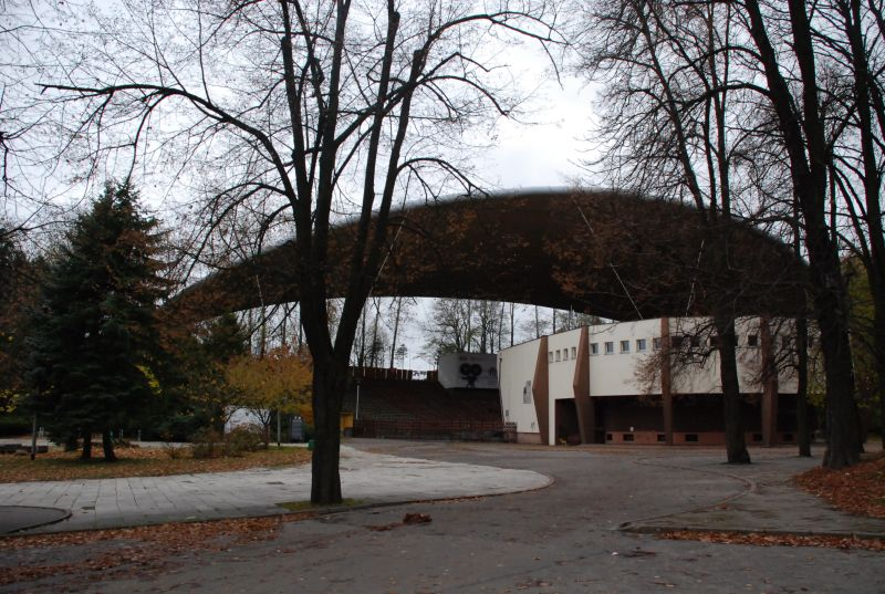 Amfiteatr